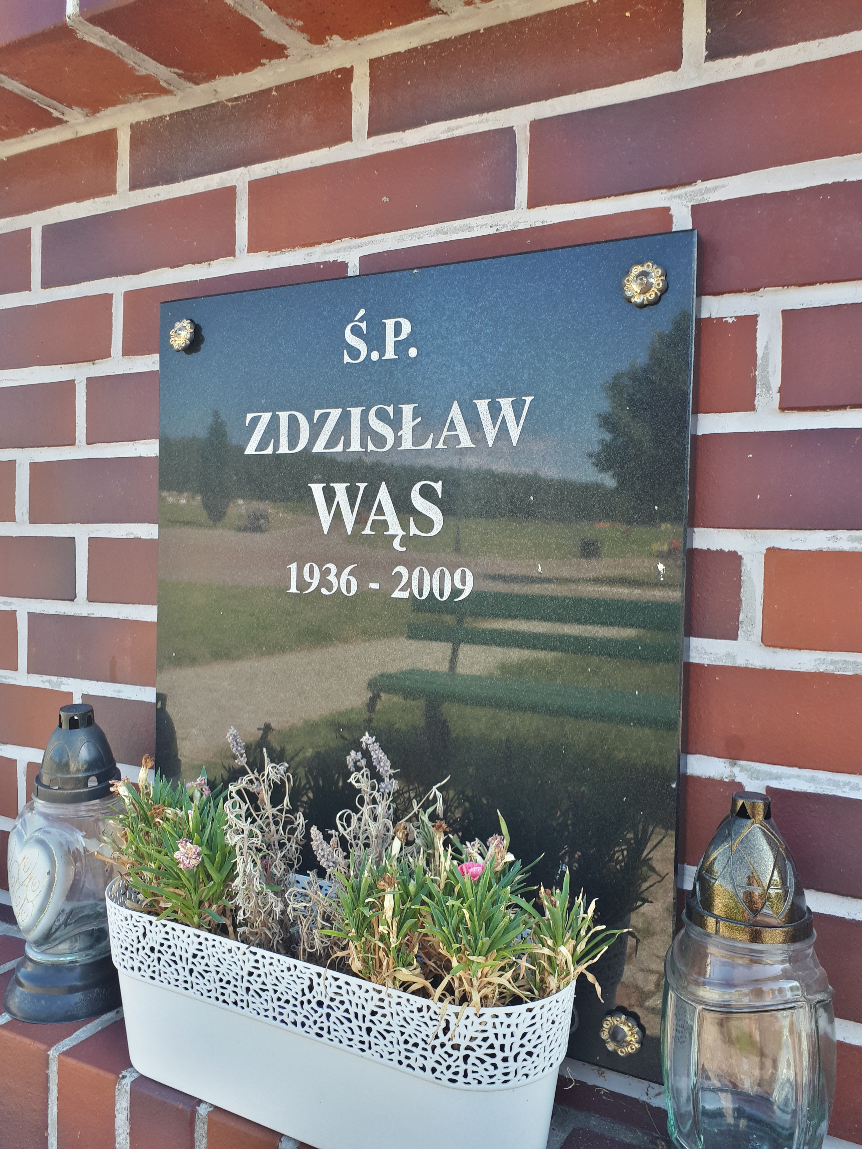 Grób Zdzisława Wąsa w kolumbariach na Cmentarzu Komunalnym w Elblągu